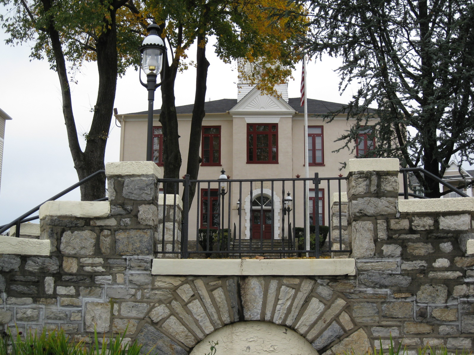 Hatboro, Pennsylvania